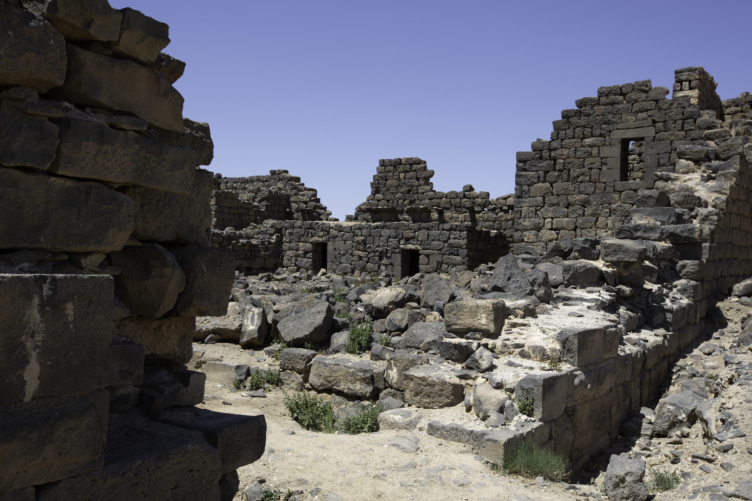 Qasr Deir Al Kahf (Interior)